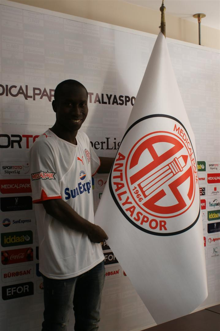 Diarra İmza töreni'nde Antalyaspor formasıyla Foto : Murat Özgen